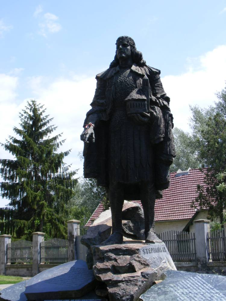 Szent István-szobor (Györfi Sándor, 2001, Bronz, andezit gránit). - Magyarország, Jász-Nagykun-Szolnok megye, Szolnok, Szent István tér, a vártemplom előtt látható.